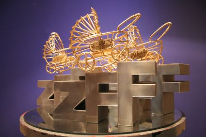 ZFF Nagrada - "Zlatna kolica"